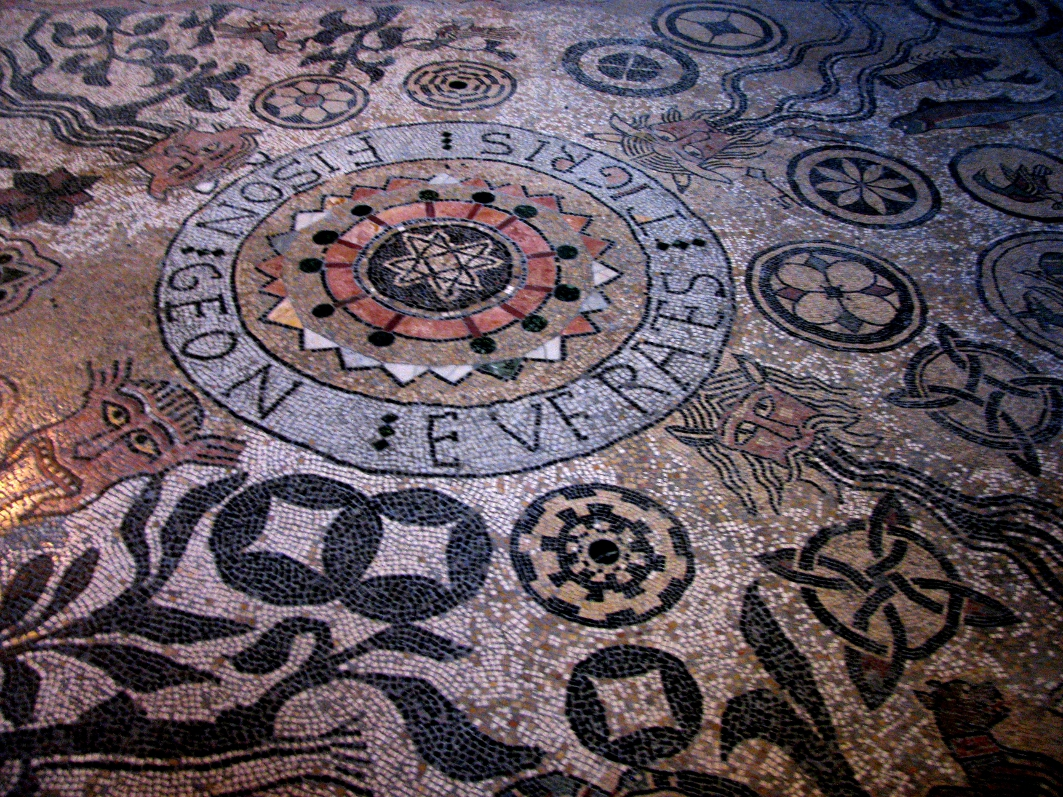 Mosaïque des quatre fleuves, partie centrale, XIIe siècle. Chapelle de l'ancien palais épiscopale - Die (Drome) France